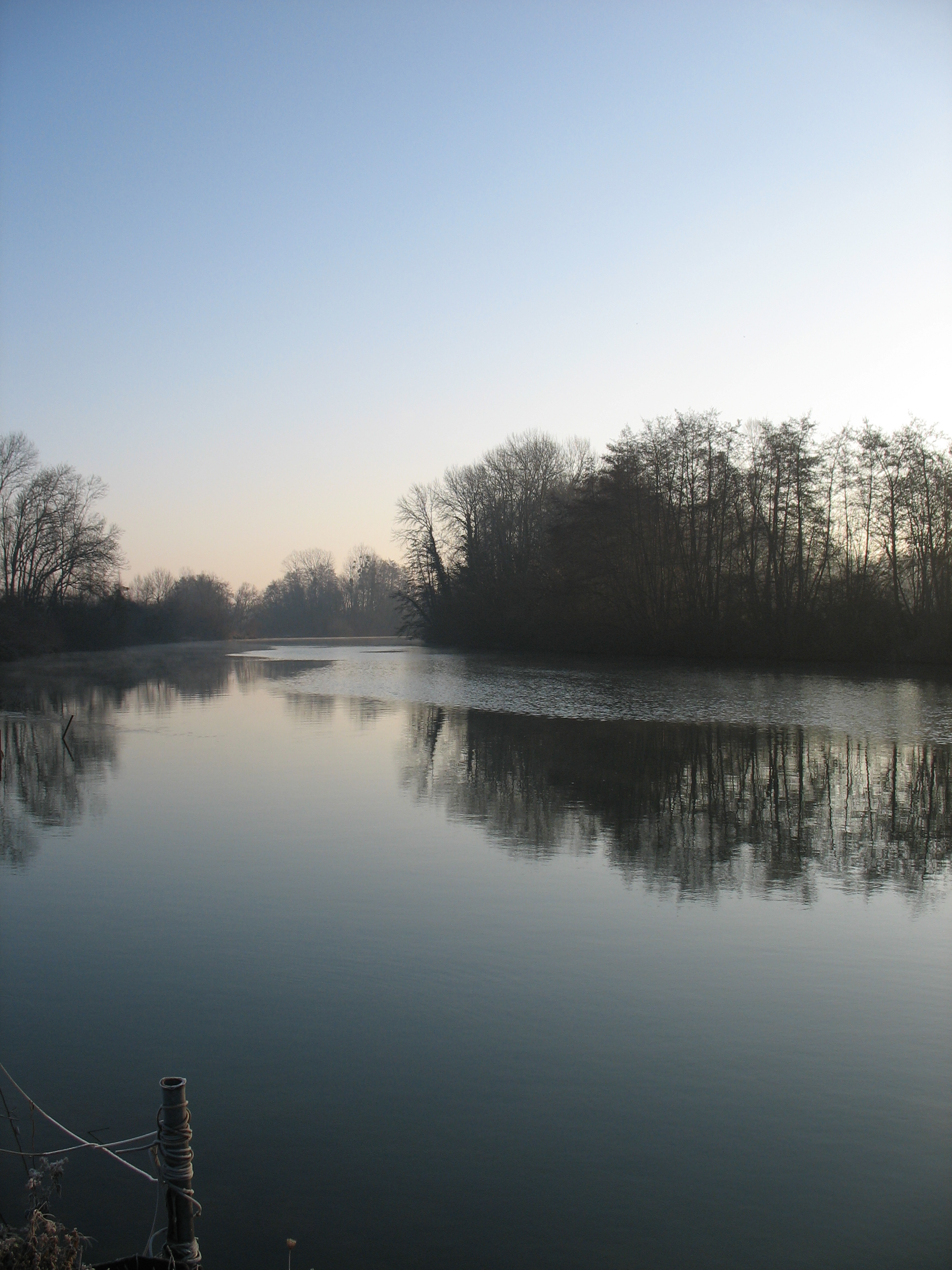 La Seine